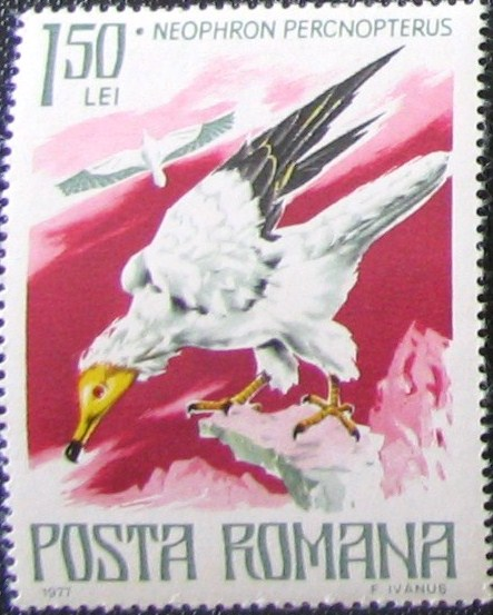 Source: Post of Romania